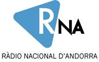 Logotip de l'emissora pública 'Ràdio Nacional d'Andorra'